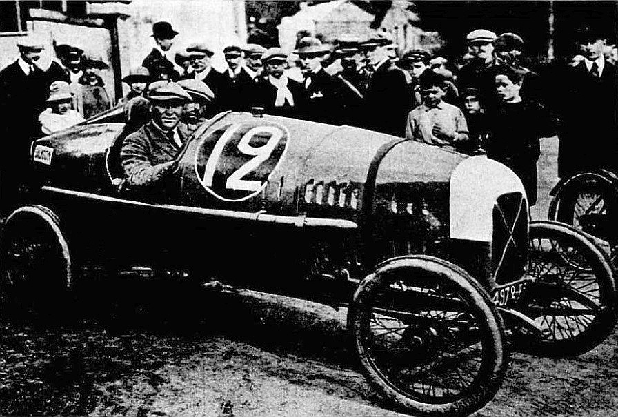 Lucien Desvaux, deuxième du Grand Prix automobile de l'U.M.F. Cyclecars au Mans en 1922 sur Salmson VAL (Le Monde Illustré du 23 septembre 1922, p.261)